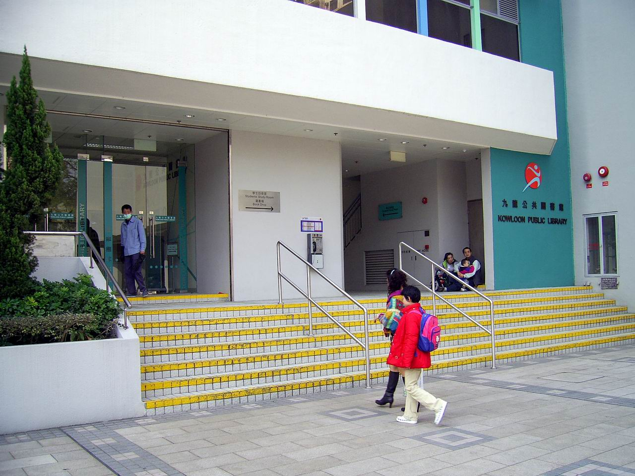 九龍公共圖書館平-{台}-出入口